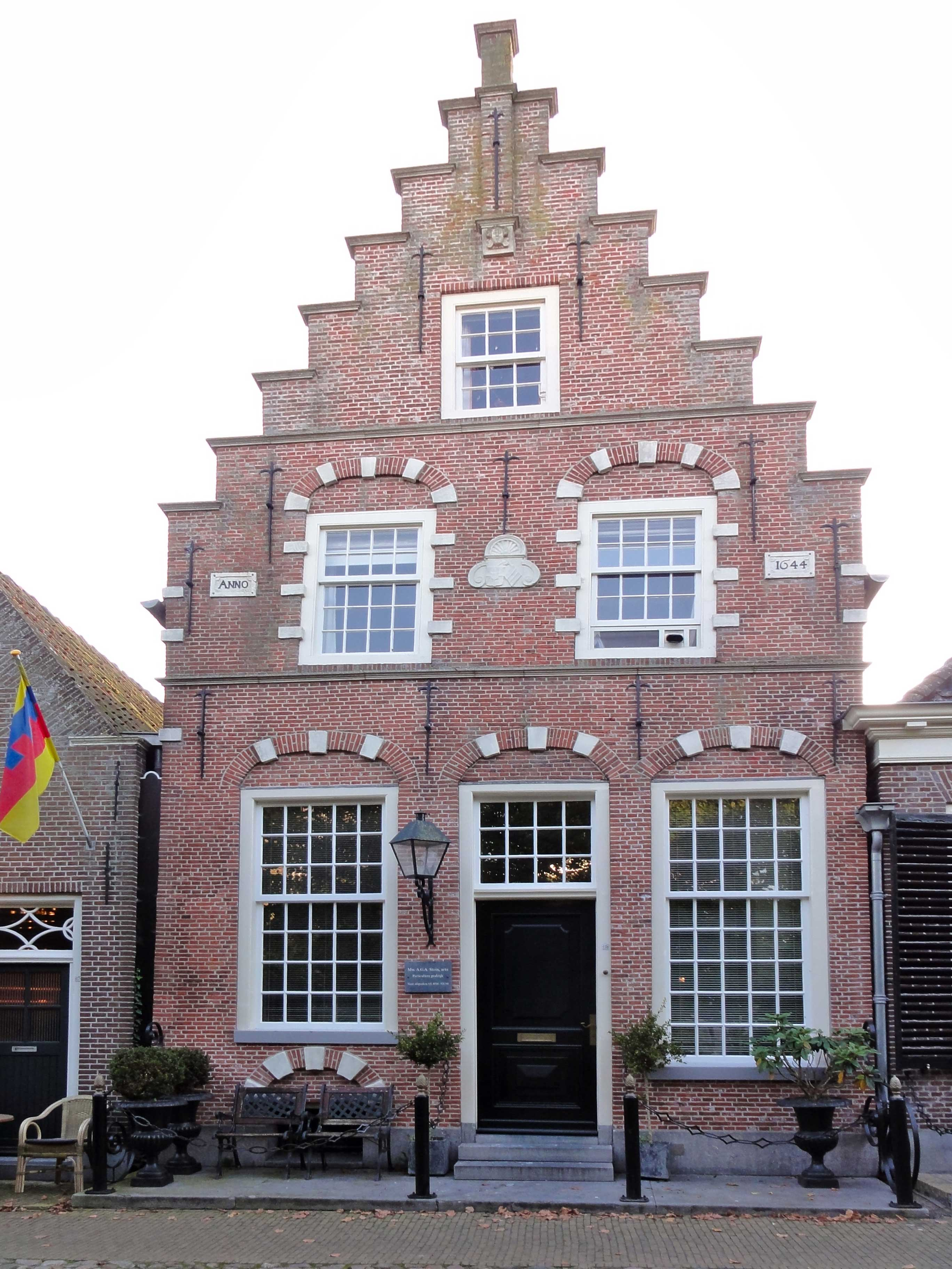 Voorstreek 118 in Sloten